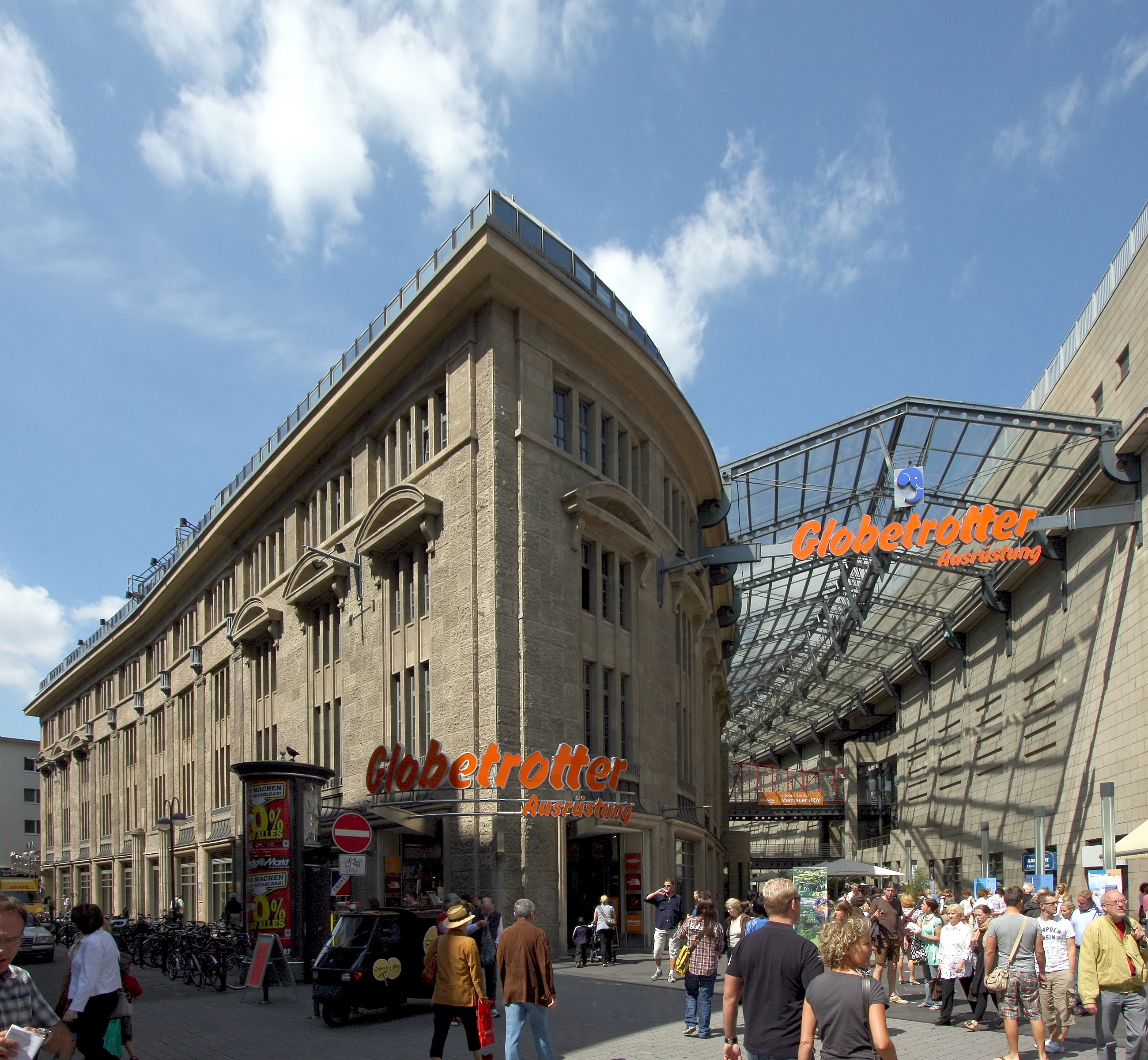 Olivandenhof in Köln, Südostansicht. Architekt: Hermann Eberhard Pflaume (1869-1921). Heutige Nutzung durch Globetrotter Ausrüstung. This is a photograph of an architectural monument.